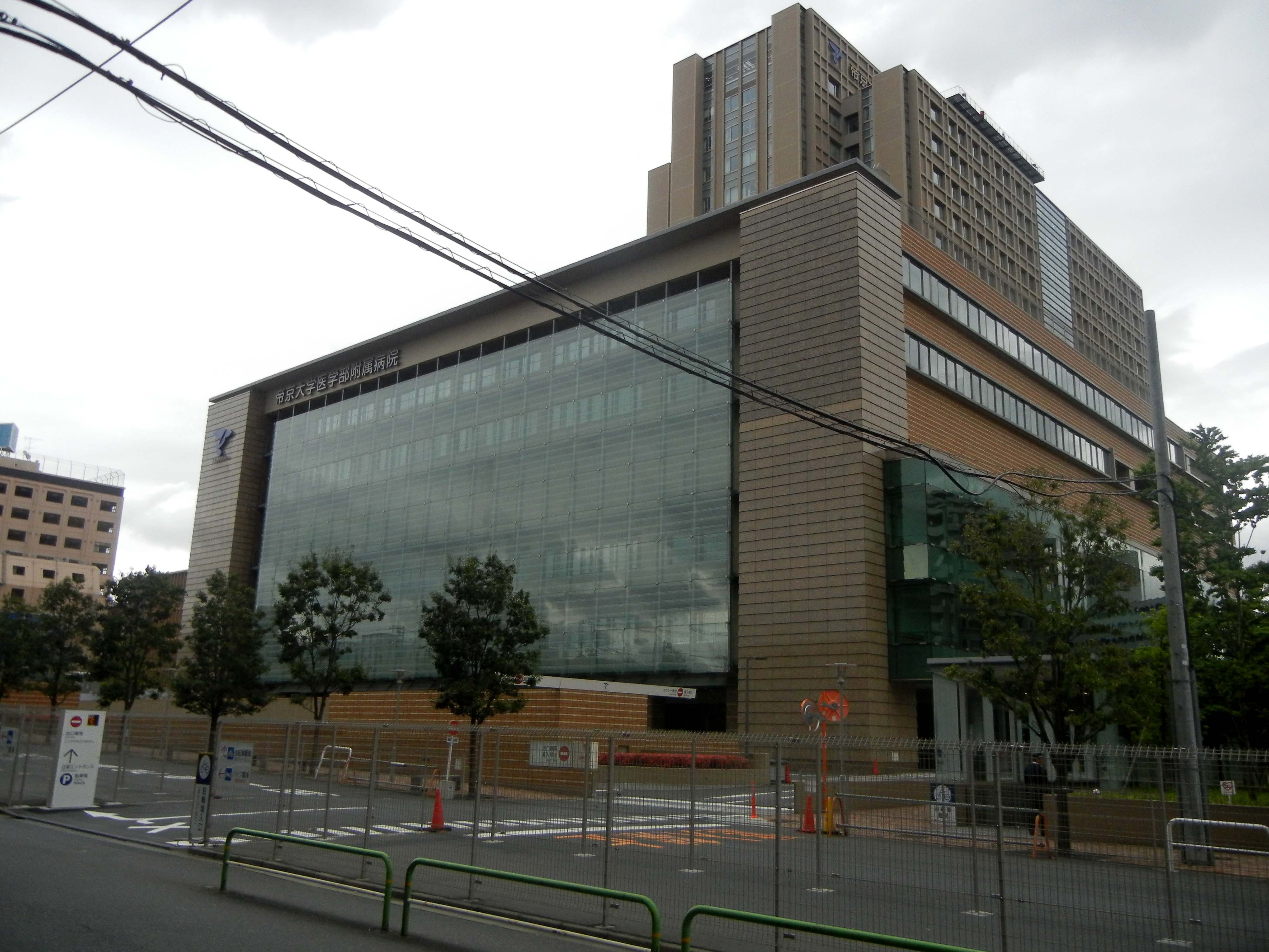 帝京大学板橋キャンパス 医学部附属病院